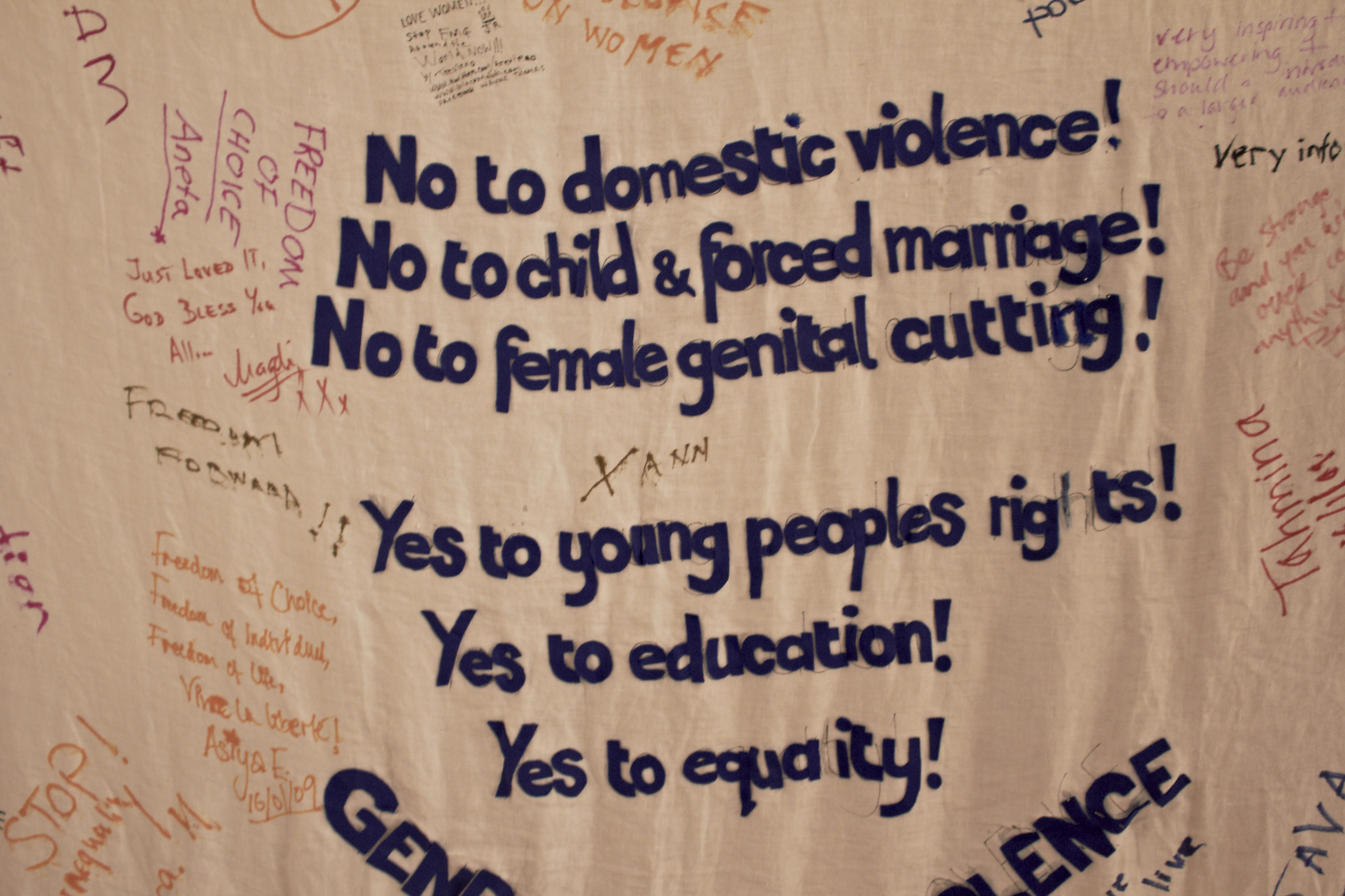 No to female circumcision poster